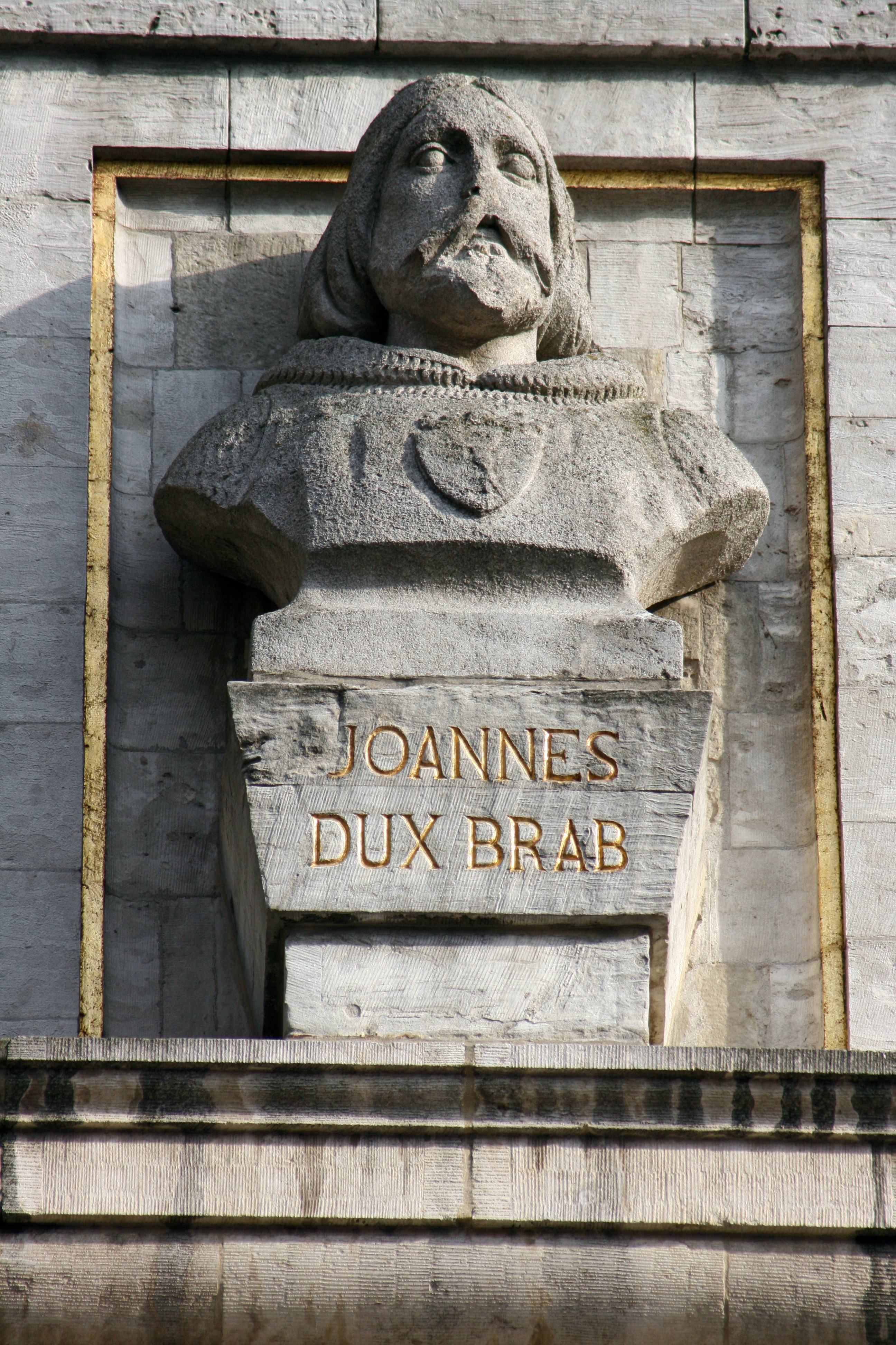 Grand-Place, Bruxelles, Belgique. Maison des Ducs de Brabant. Détail: buste d'un duc